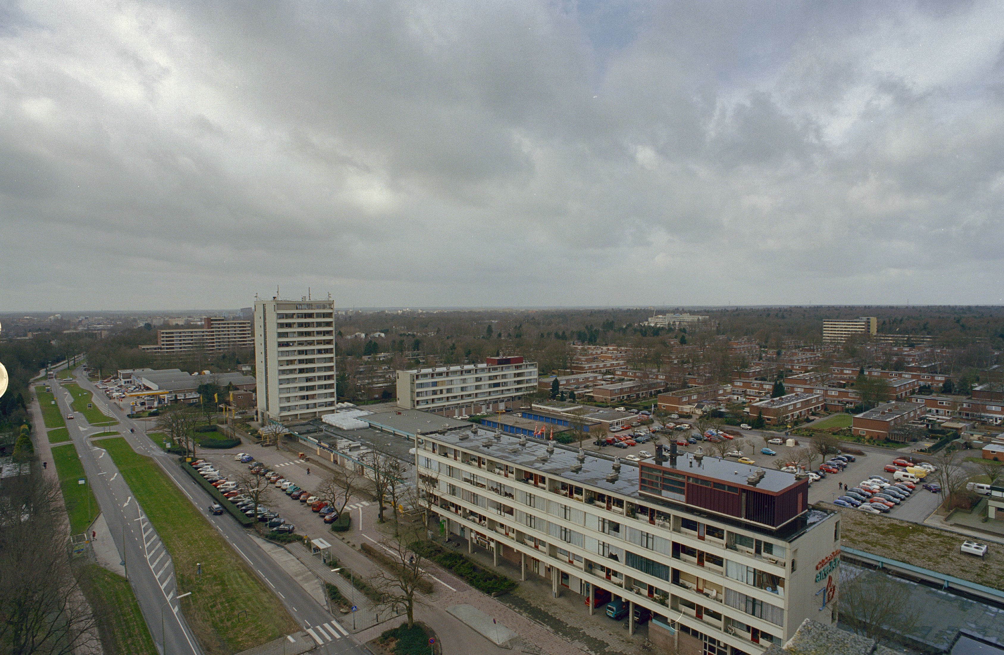 Wijk Angelslo: Overzicht van de wijk (opmerking: Wederopbouw)